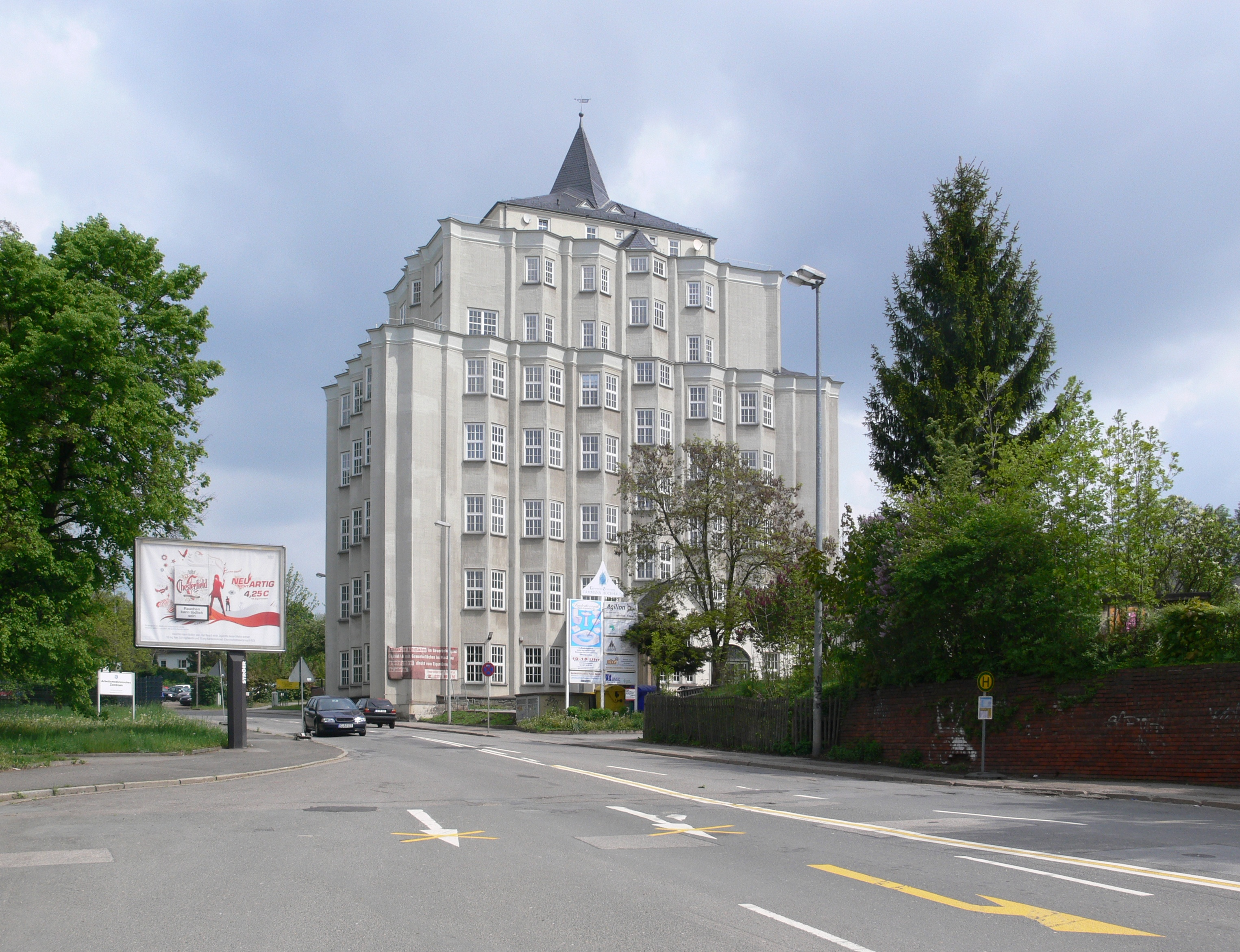 Cammann-Hochhaus (Chemnitz-Furth)